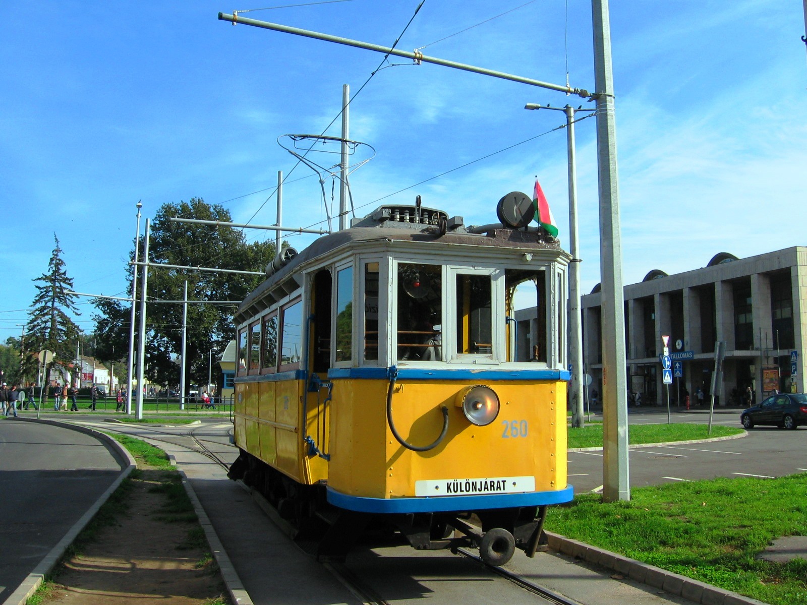 nosztalgiavillamos